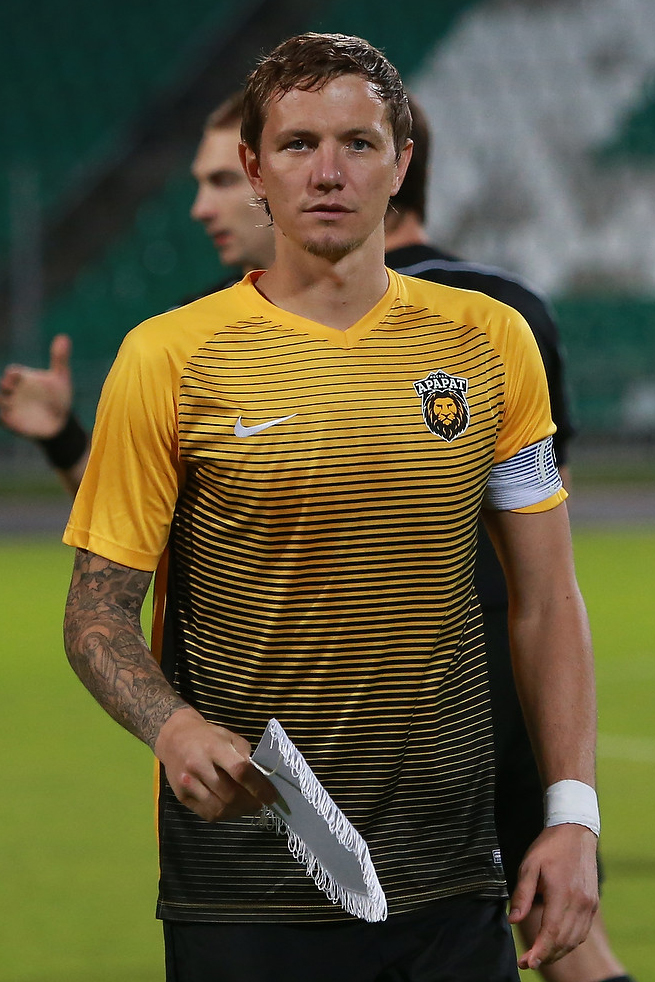 «Арарат» - «Торпедо»